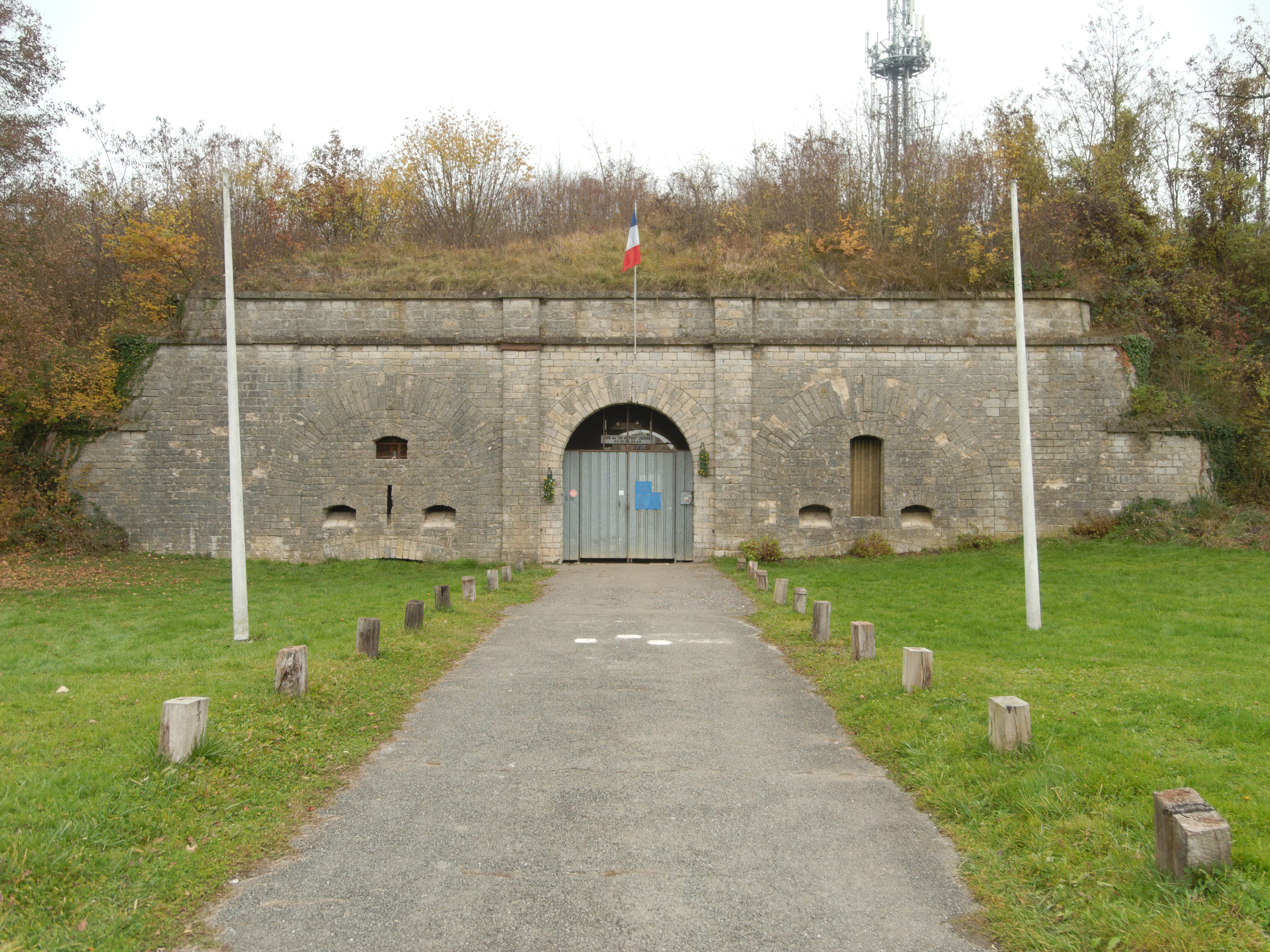 Fort Lachaux : entrée du réduit.